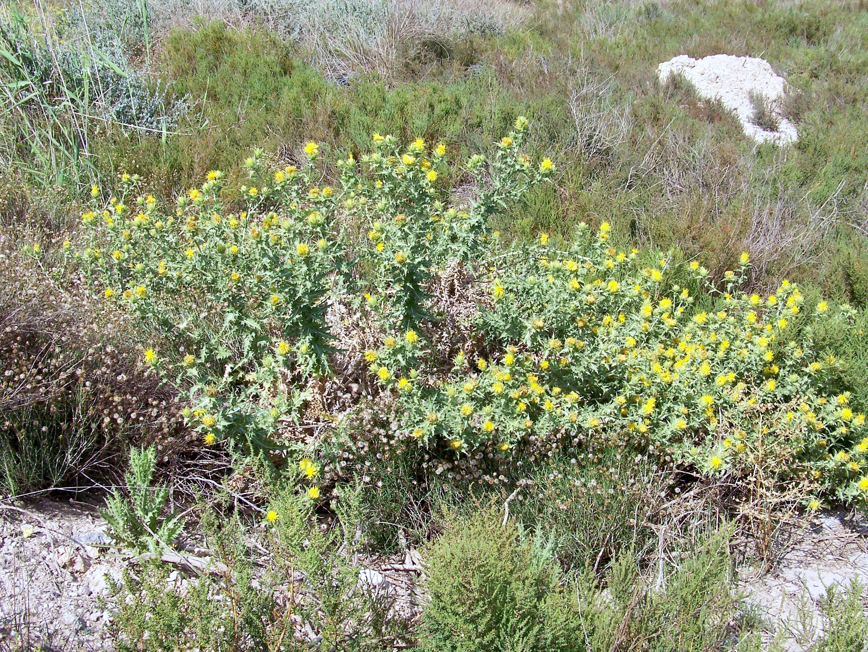 Carthamus arborescens : Vista general - Camino de la Azarbe de Patricio, Albatera (Alicante, España).